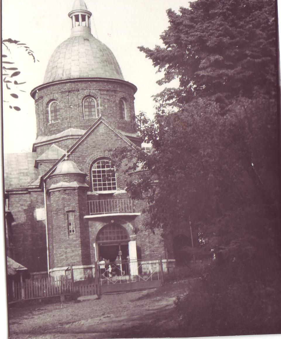 70-80 рр